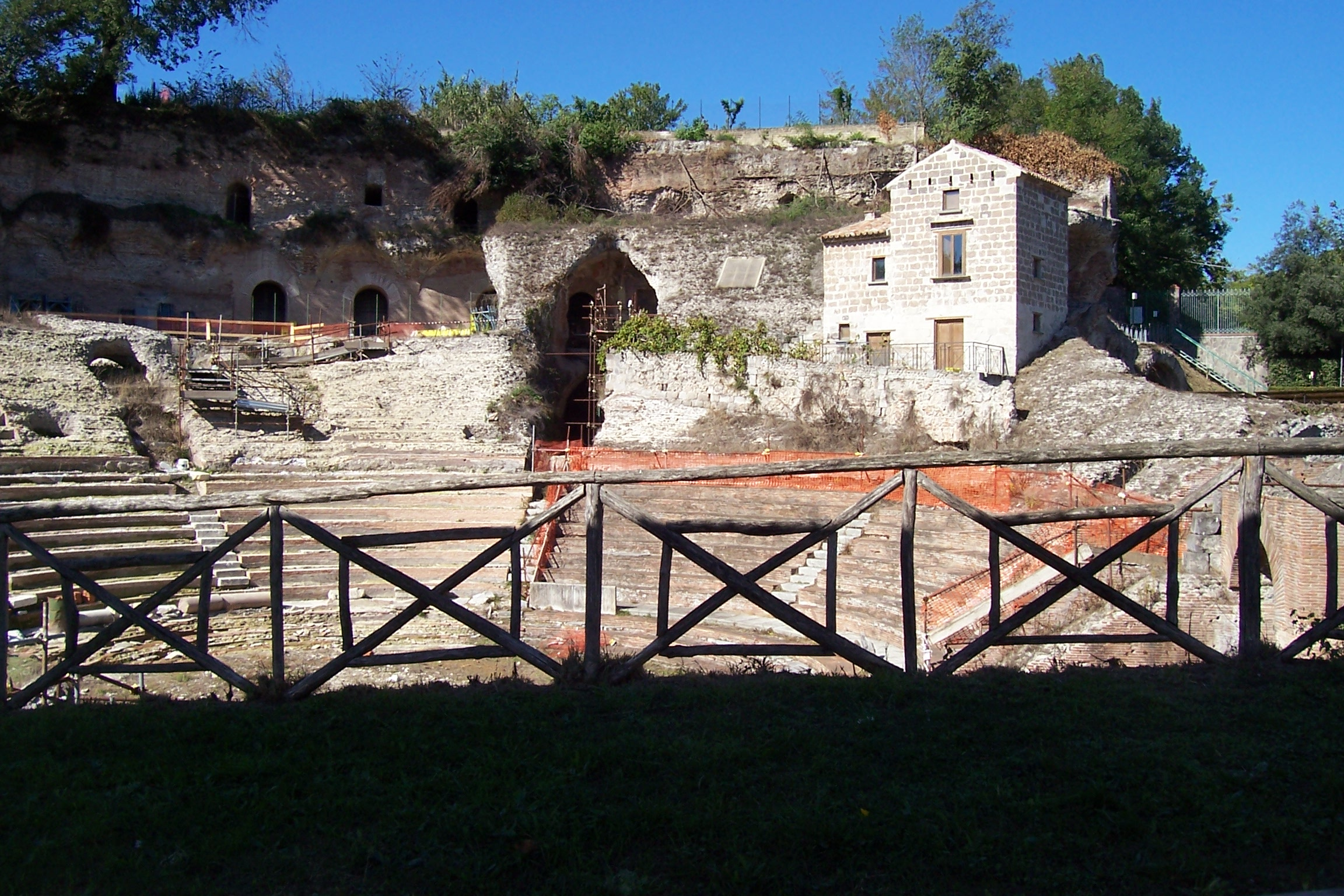 Teatro romano di Teanum Sidicinum - MIBAC This is a photo of a monument which is part of cultural heritage of Italy.